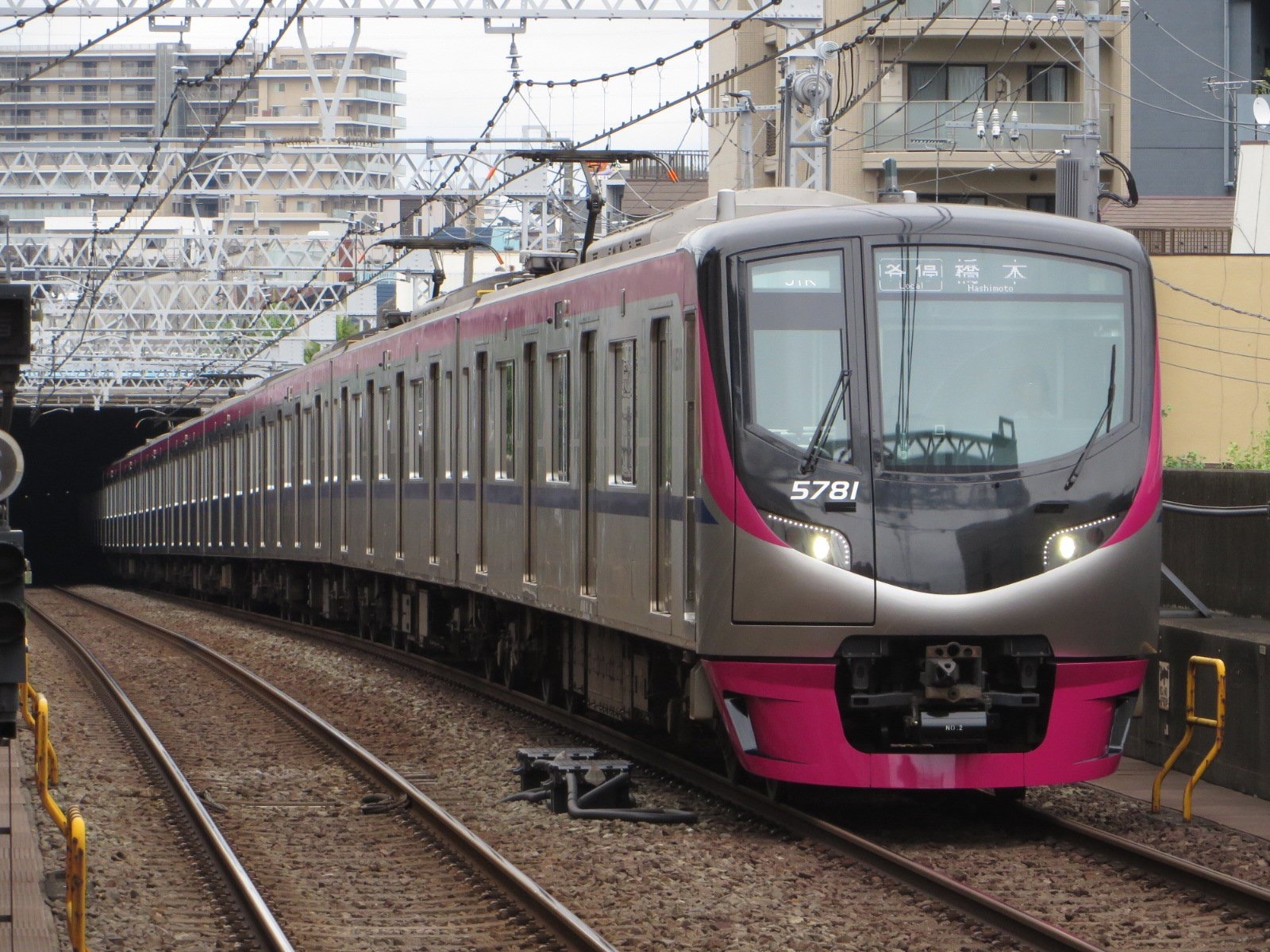 京王5000系5731F 船堀駅